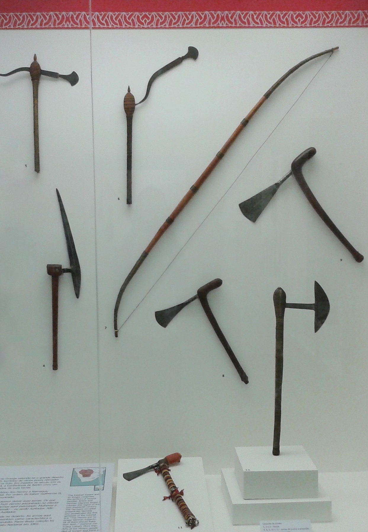 Português do Brasil: Armaria. Acervo de etnologia africana e afro-brasileira do Museu Nacional/UFRJ - Rio de Janeiro, Brasil.